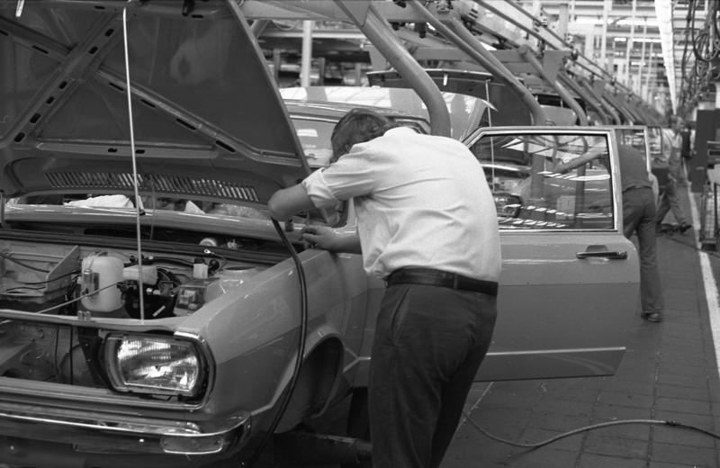 VW-Werk Wolfsburg Endmontage Passat